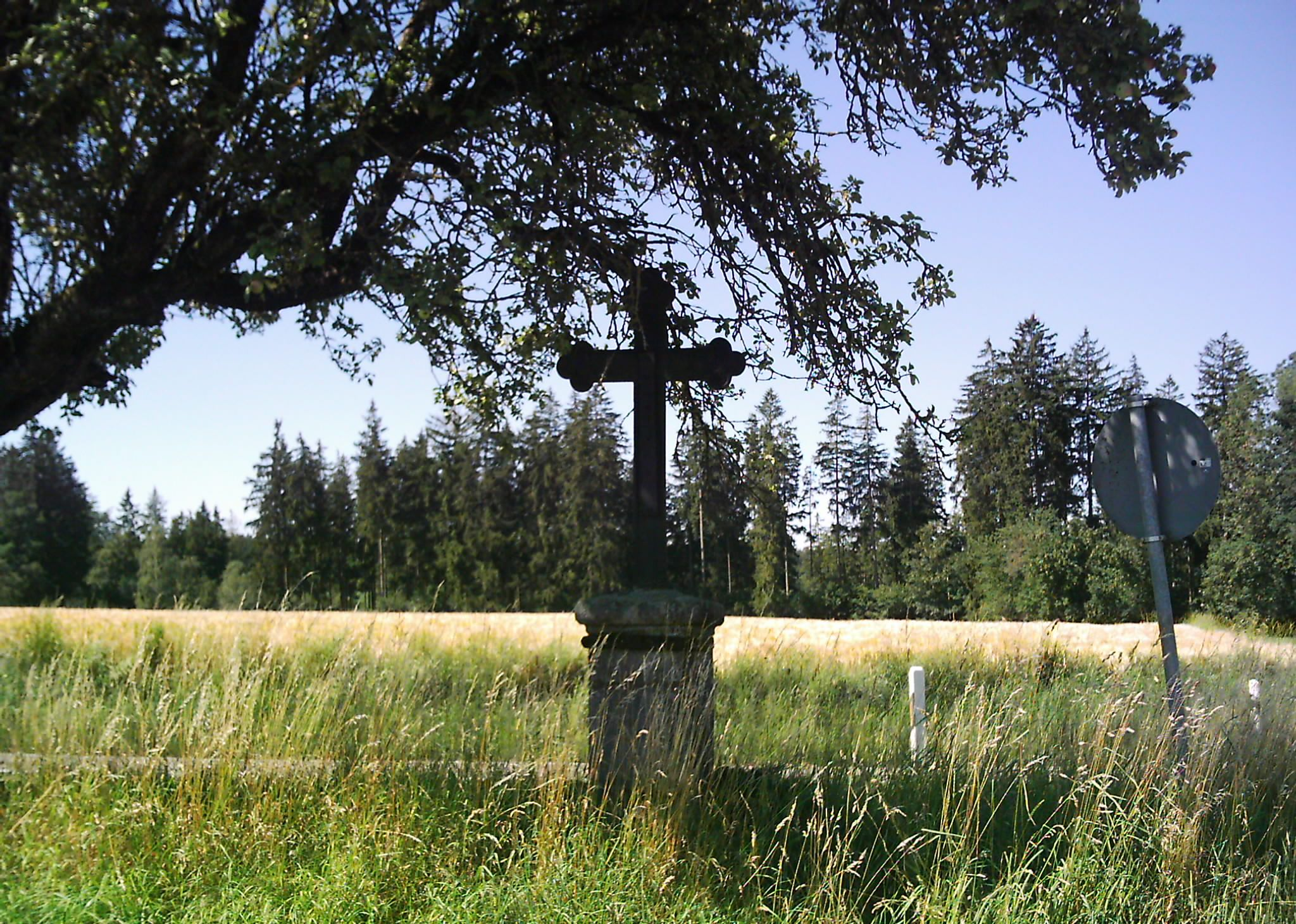 Eisernes Feldkreuz zwischen Eichenberg und Edenbachen, 88453 Berkheim, Landkreis Biberach, Deutschland